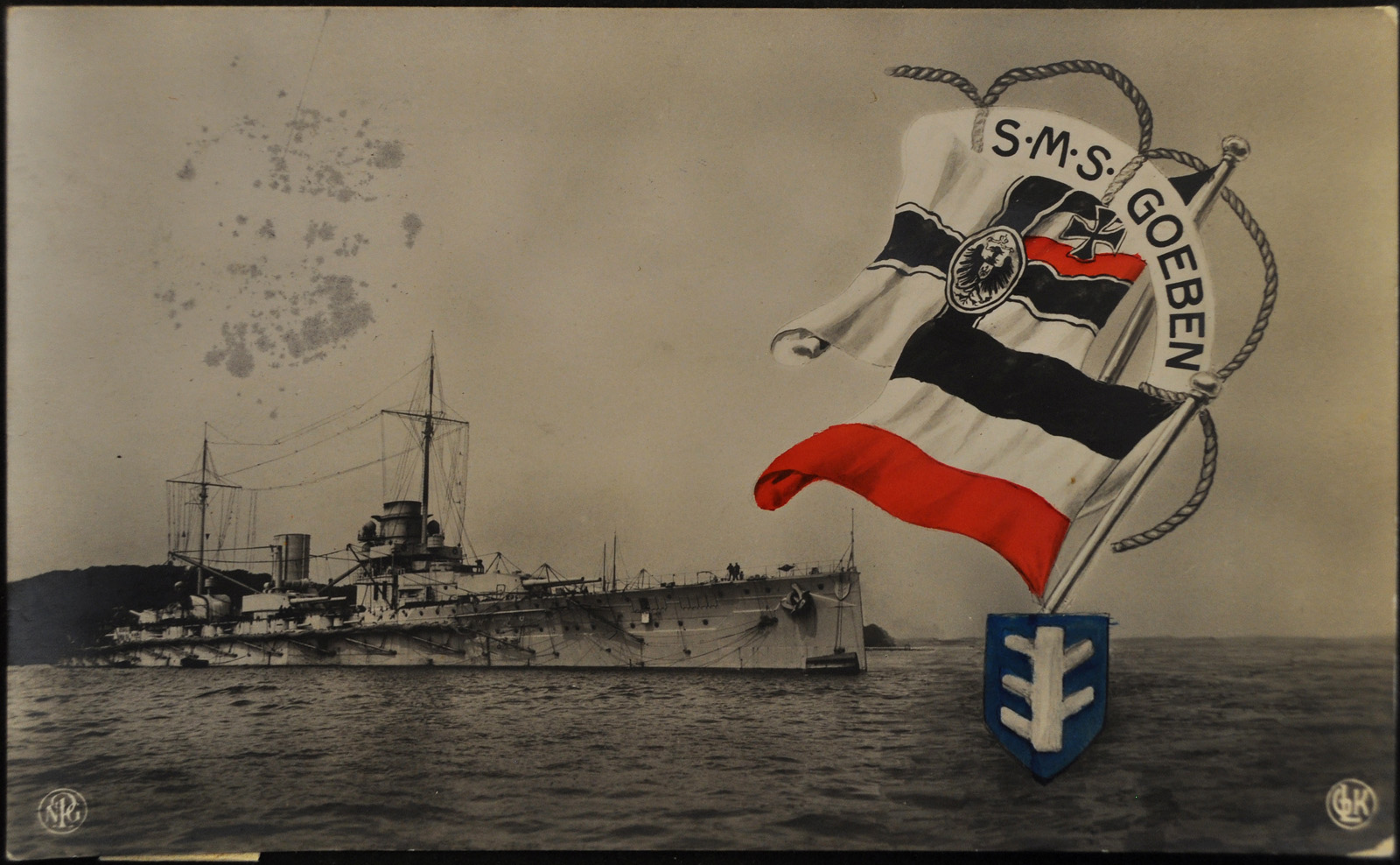 Die "SMS Goeben" war ein Großer Kreuzer (Schlachtkreuzer) der Kaiserlichen Marine der Moltke-Klasse. Benannt wurde sie nach dem preußischen General August von Goeben.